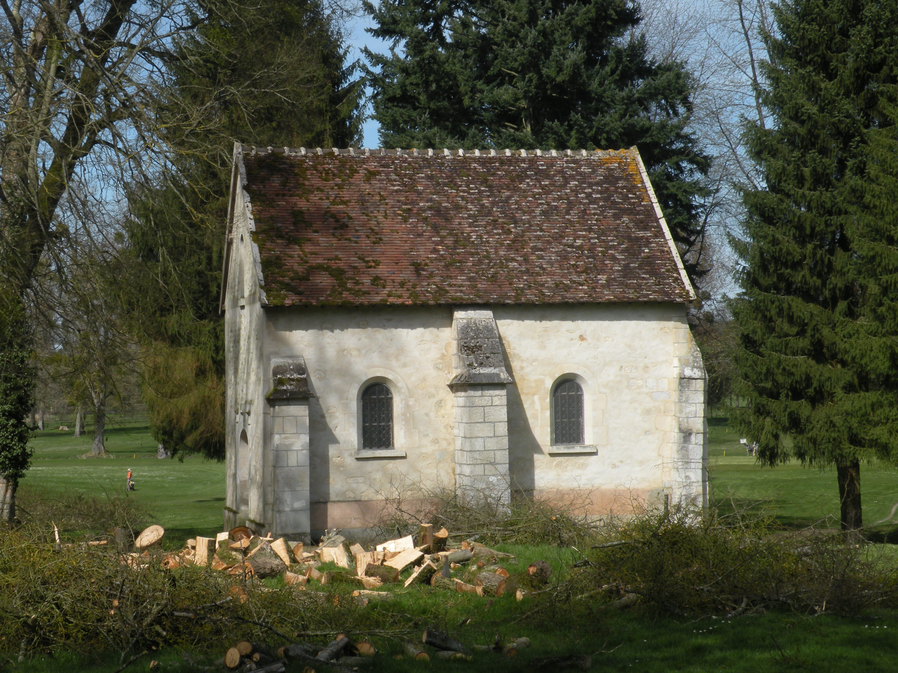 Chapelle Saint-Eutrope de Chaumont-en-Vexin